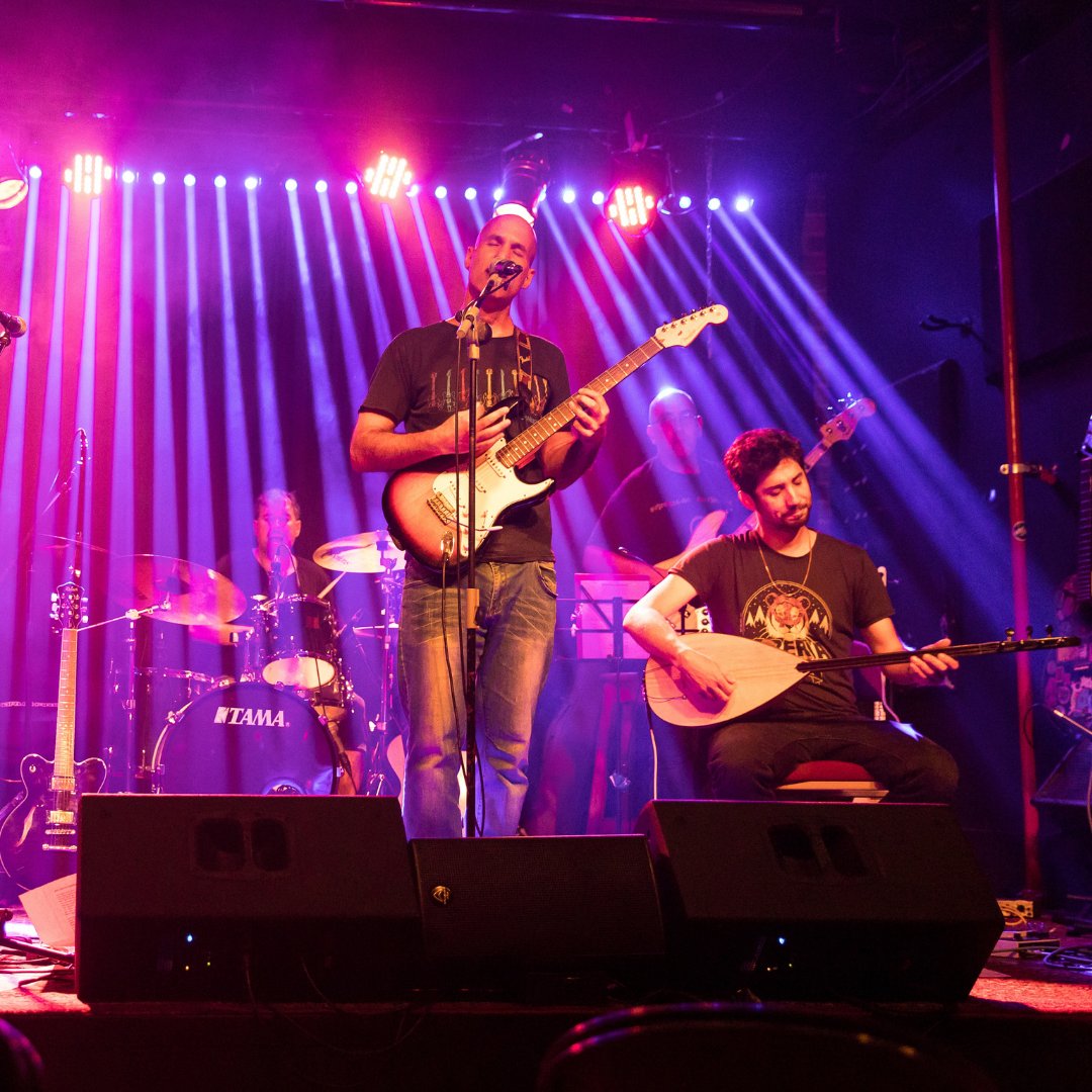 הזמר שחר כהן בהופעה בבר גיורא תל אביב - השקת האלבום 20 40